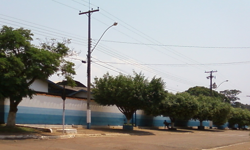 Fachada da Escola Sete de Setembro.